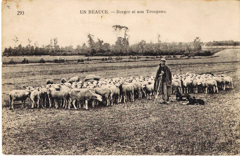 293 En Beauce. - Berger et son Troupeau. Neurdein frères (France).